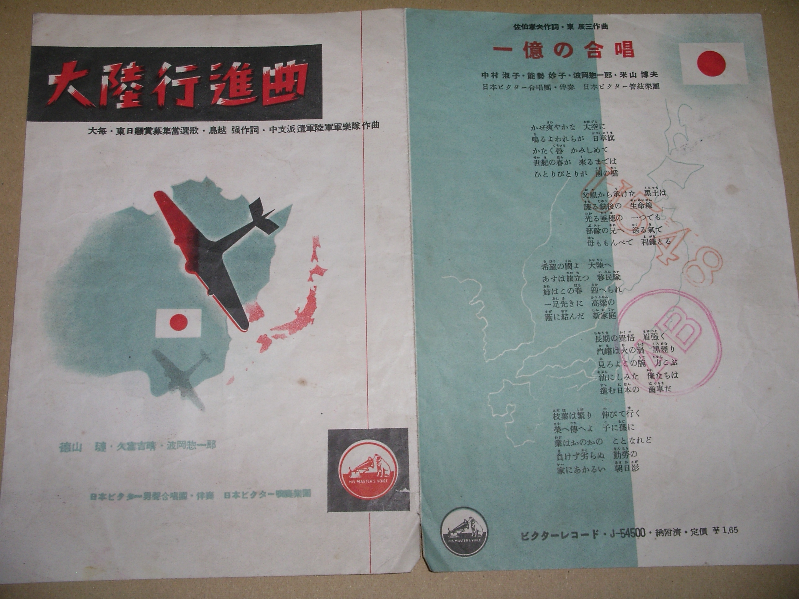 1938年ビクターレコードから発売された大陸行進曲の歌詞カードを撮影。